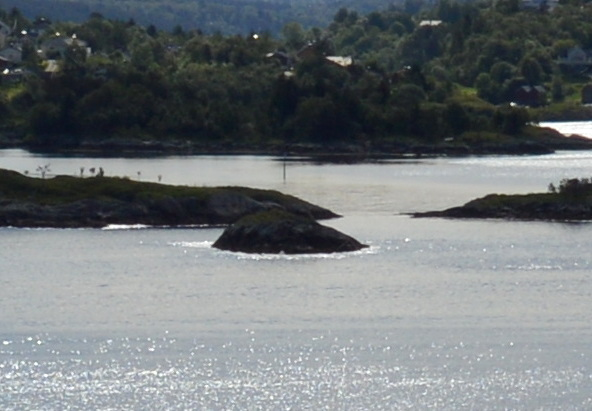 Lyktholmen, Insel bei Alesund